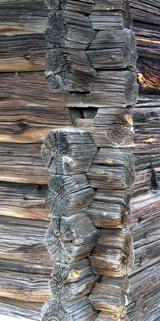 Sexkantskallar (och en avbruten hals som visar dubbelkatten) på lada (f.d Härbre?) i Rista, Gagnef sn, Dalarna, daterad efter 1596.